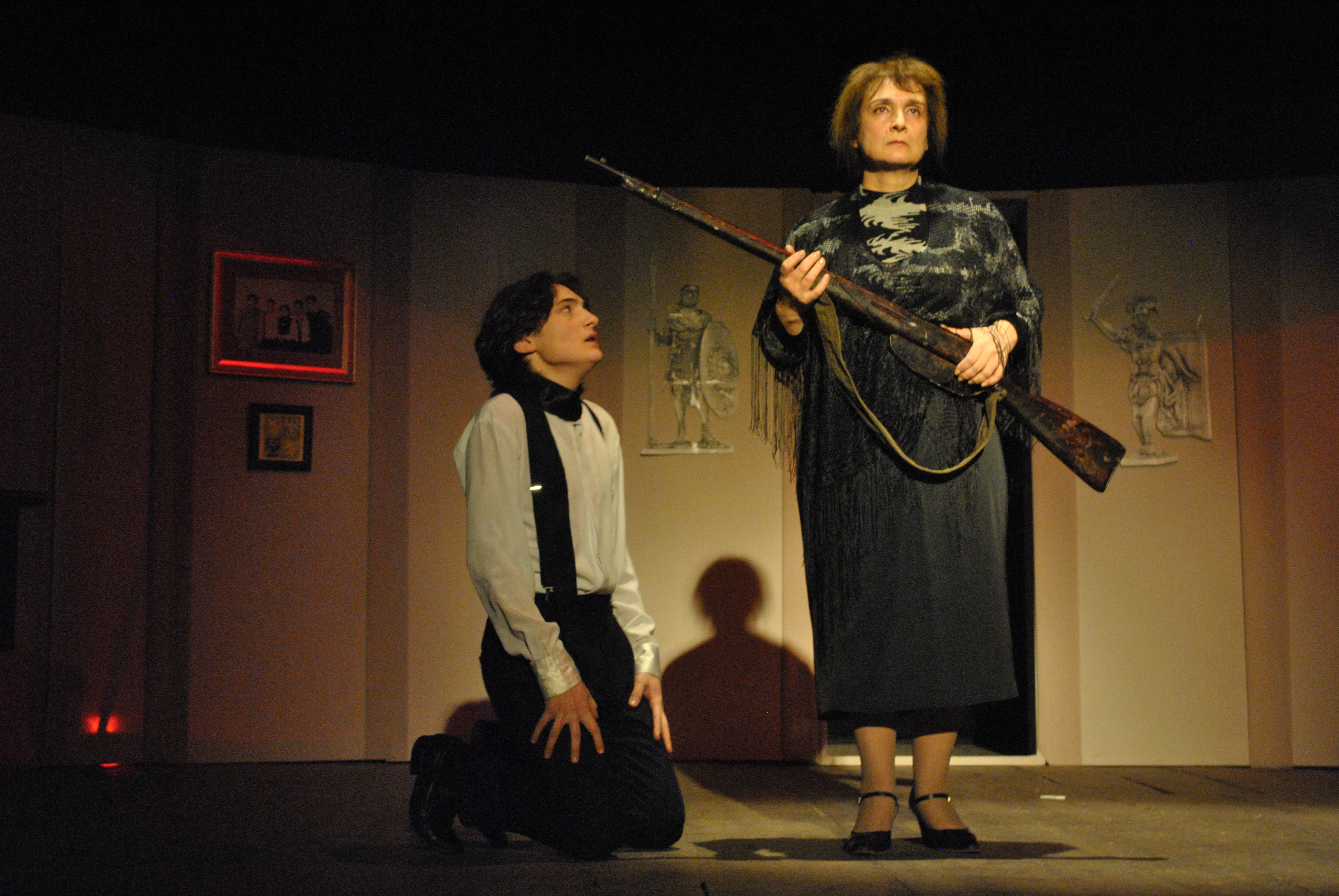 "Մայրը" 2012թ